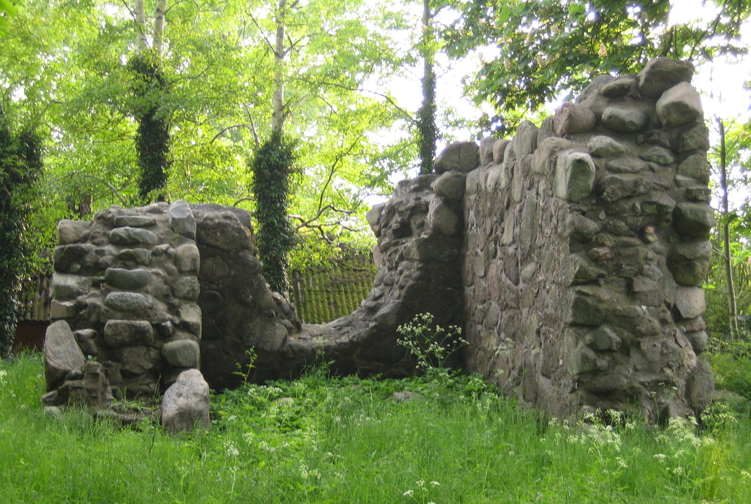 Ruinen efter den gamla kyrkan i Börringe, Skåne